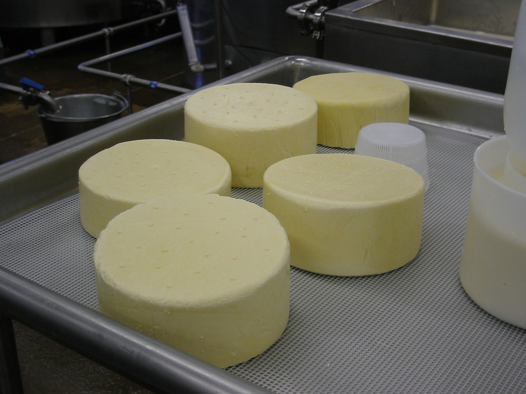 Asiago